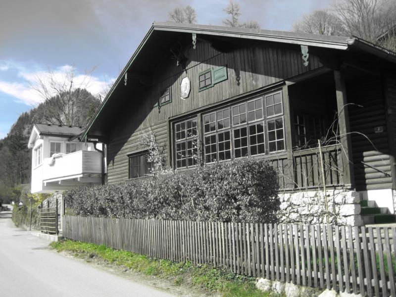 Alfred Gerstenbrands Haus in St. Gilgen